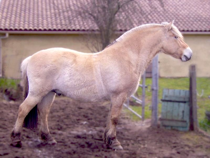 Hongre Fjord 10 ans